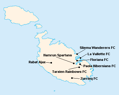 Répartition des clubs en Premier League Maltaise 1986-1987.